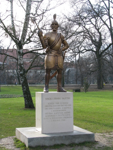 Spomenik Nikoli Zrinskom Sigetskom u Čakovcu